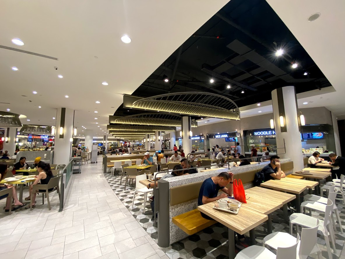 柏威年廣場之美食街